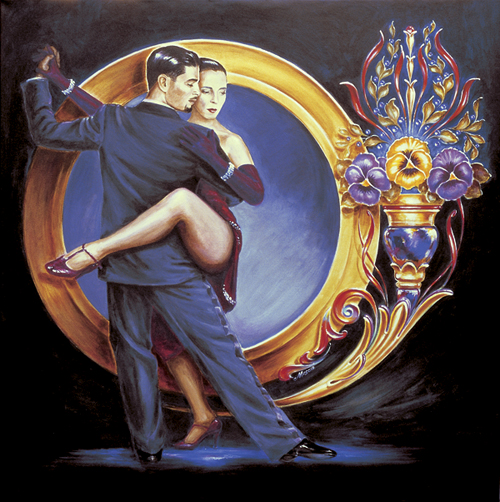 Acrilico sobre tela, 1.50 x 1.50 metros. Jorge Muscia